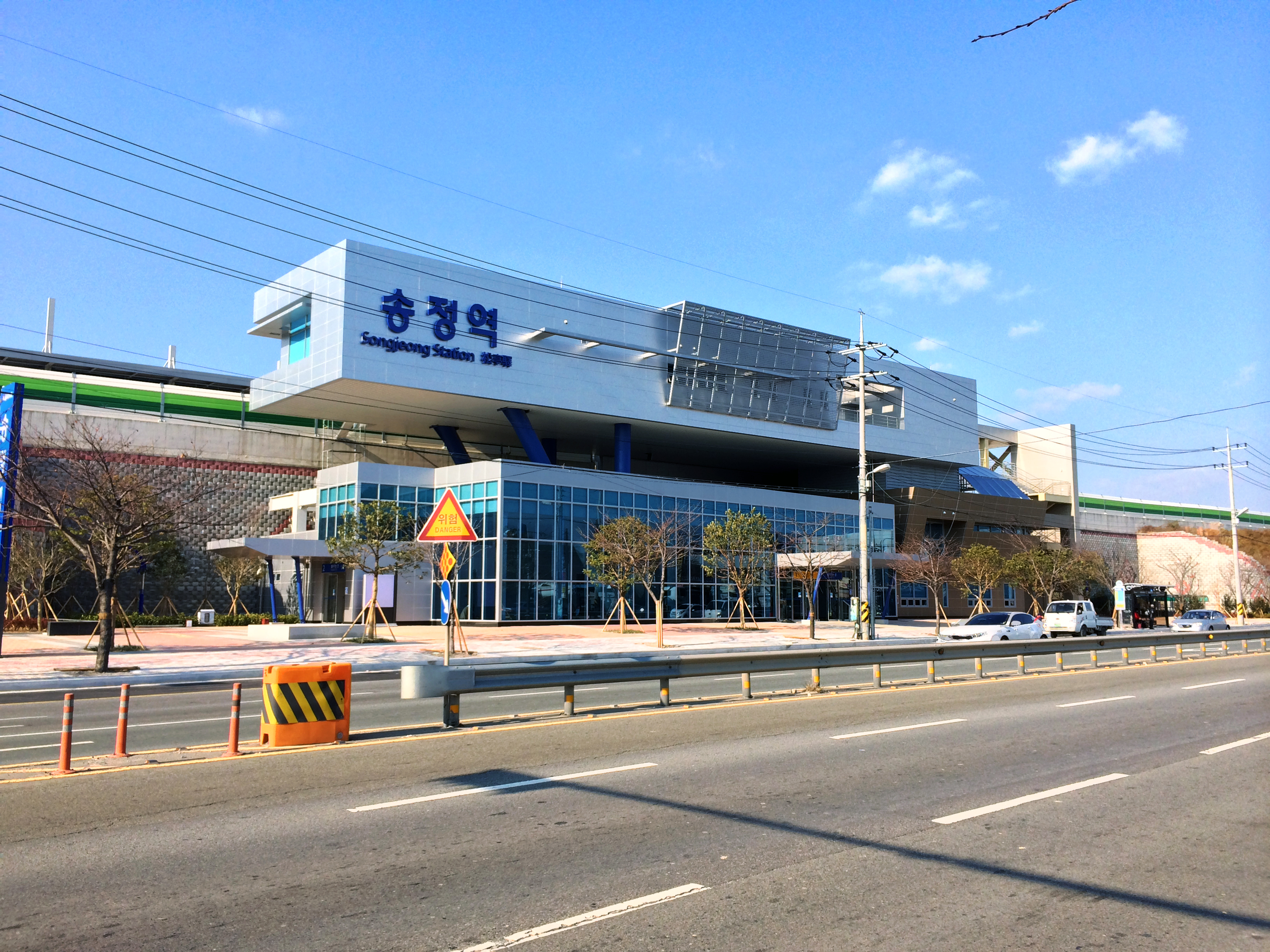 송정역 역사 (전경)